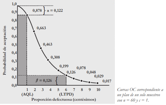 Muestreo de Asignación